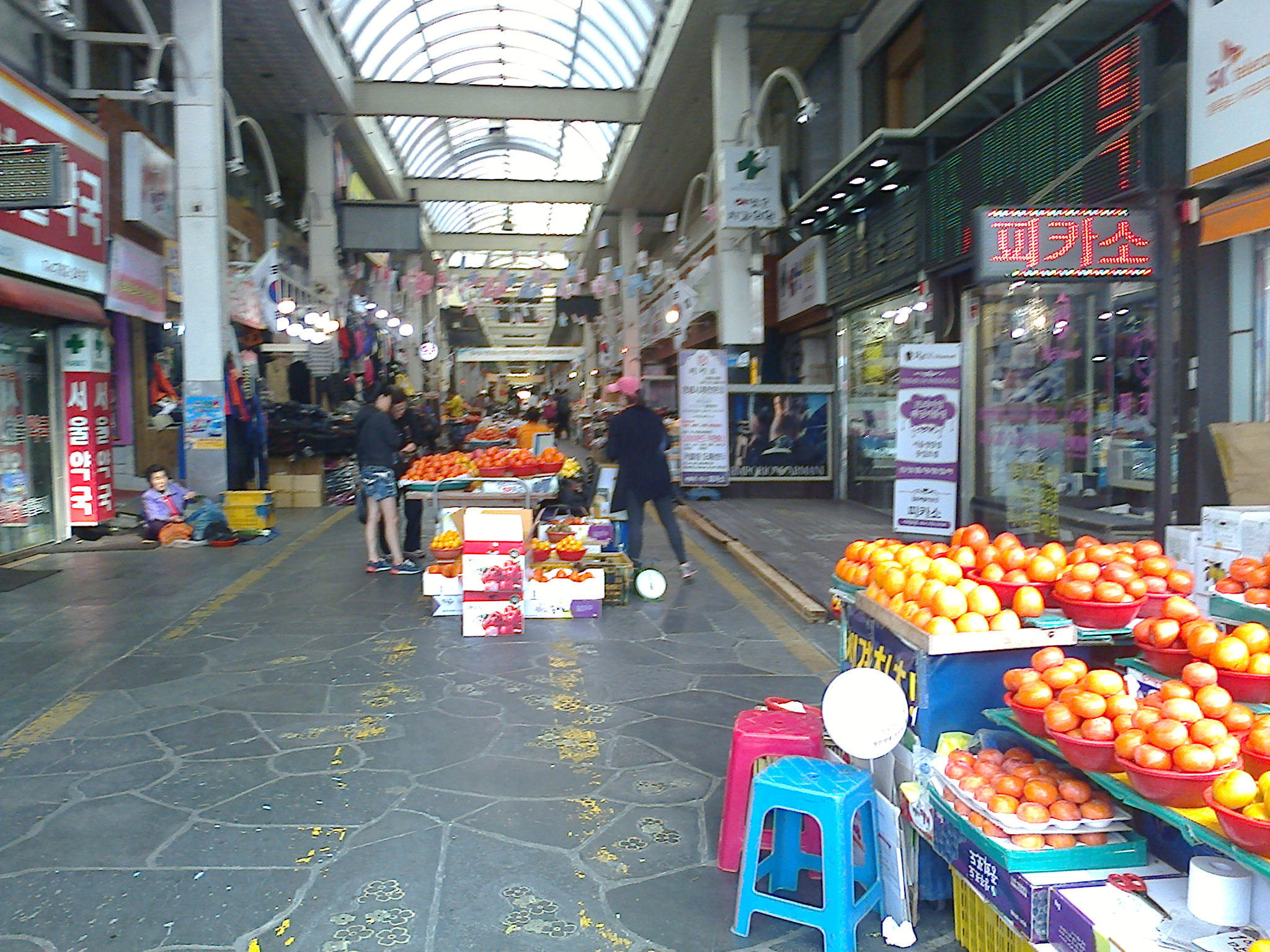 Seogwipon kauppahalli, Jeju, Korea